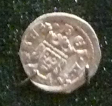 Denár Bély IV.